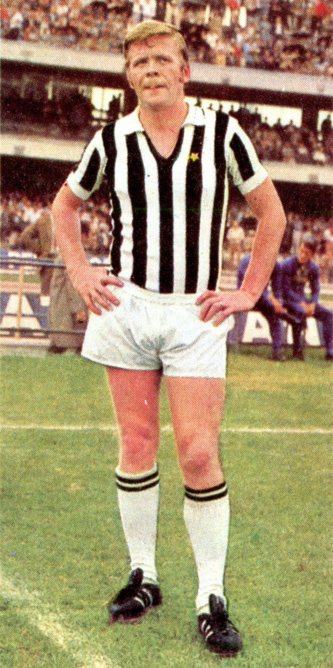 Verona, stadio Marcantonio Bentegodi. Il calciatore tedesco-occidentale Helmut Haller alla Juventus all'inizio della stagione 1970-71, in occasione di una trasferta sul campo del Verona.